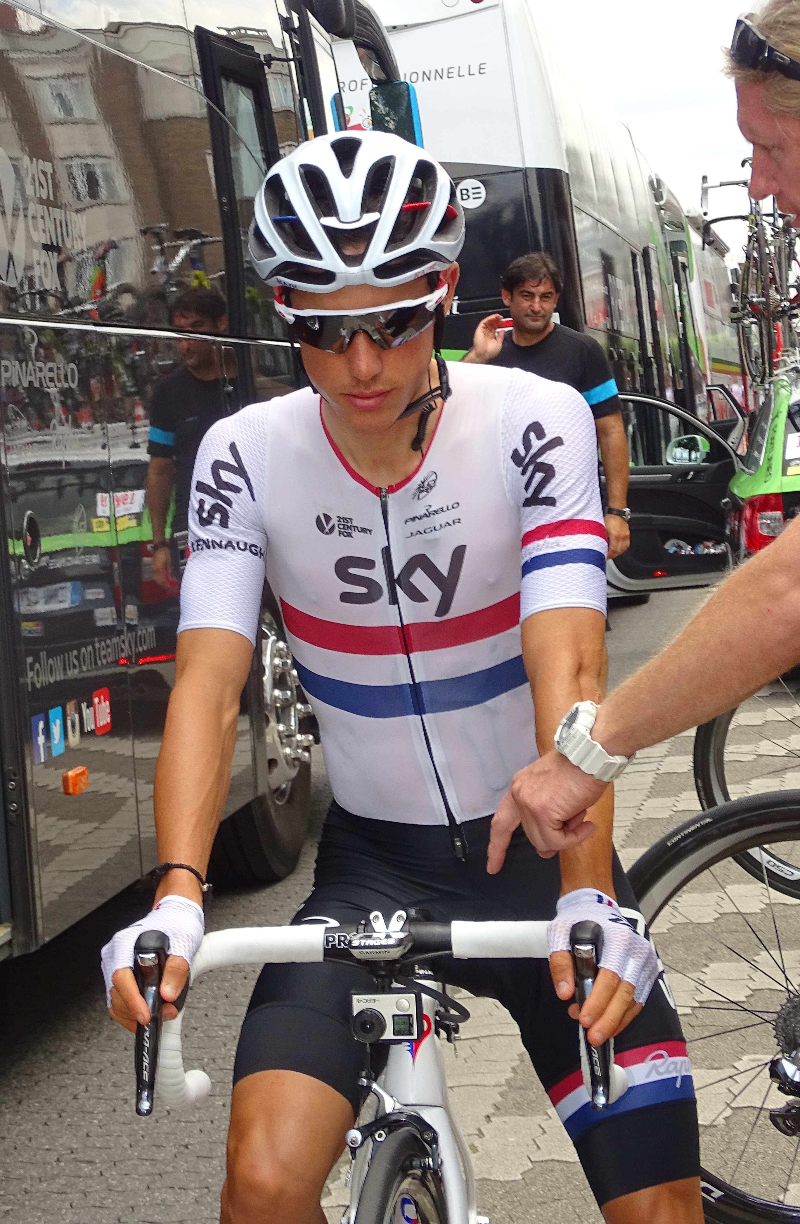 Reportage réalisé le lundi 6 juillet à l'occasion du départ de la troisième étape du Tour de France 2015 à Anvers, Belgique.